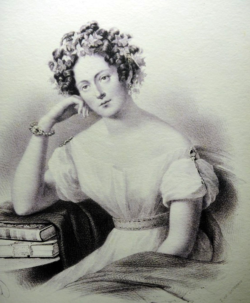 Maria Szymanowska z Wołowskich